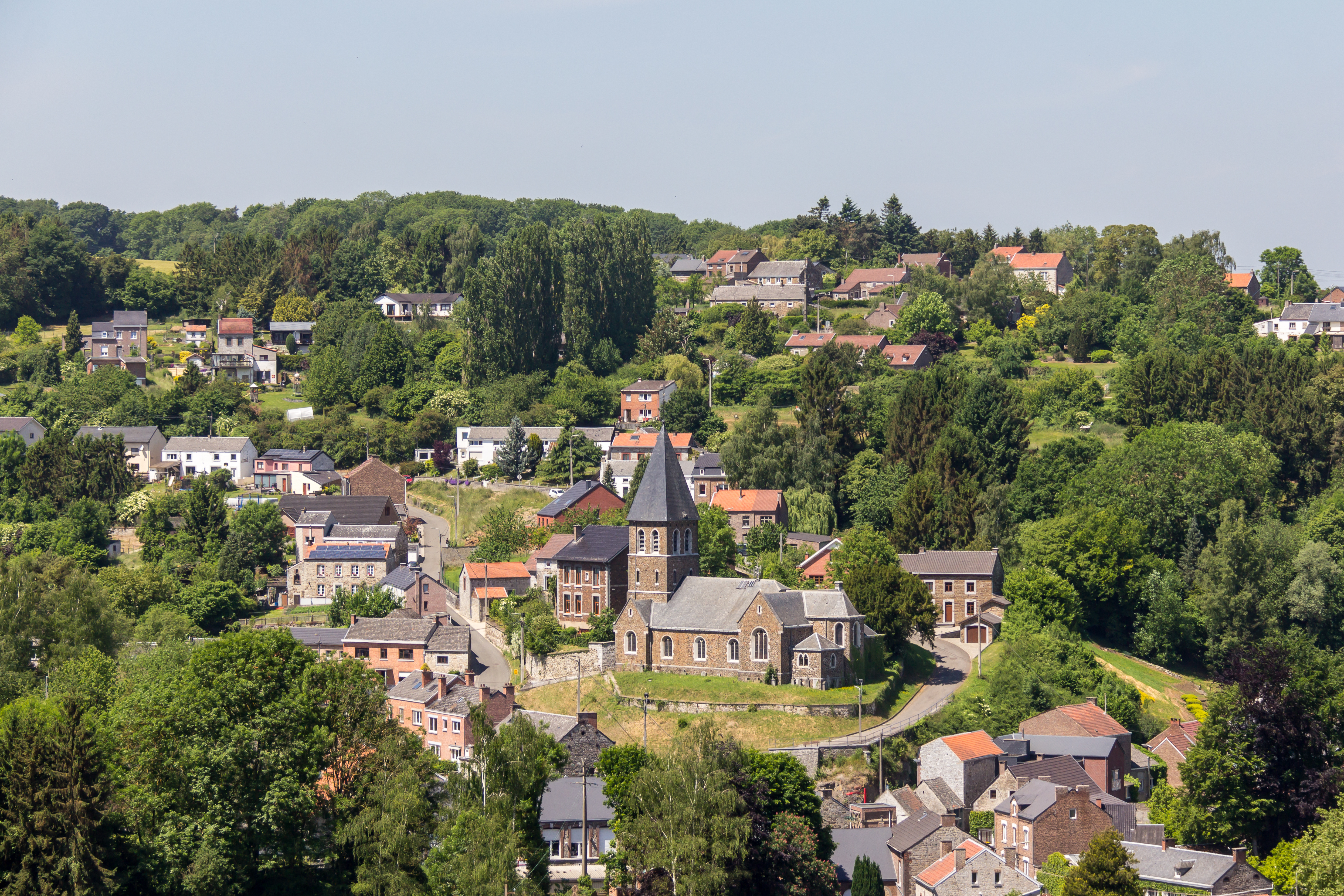 Huccorgne, section de Wanze, Belgique